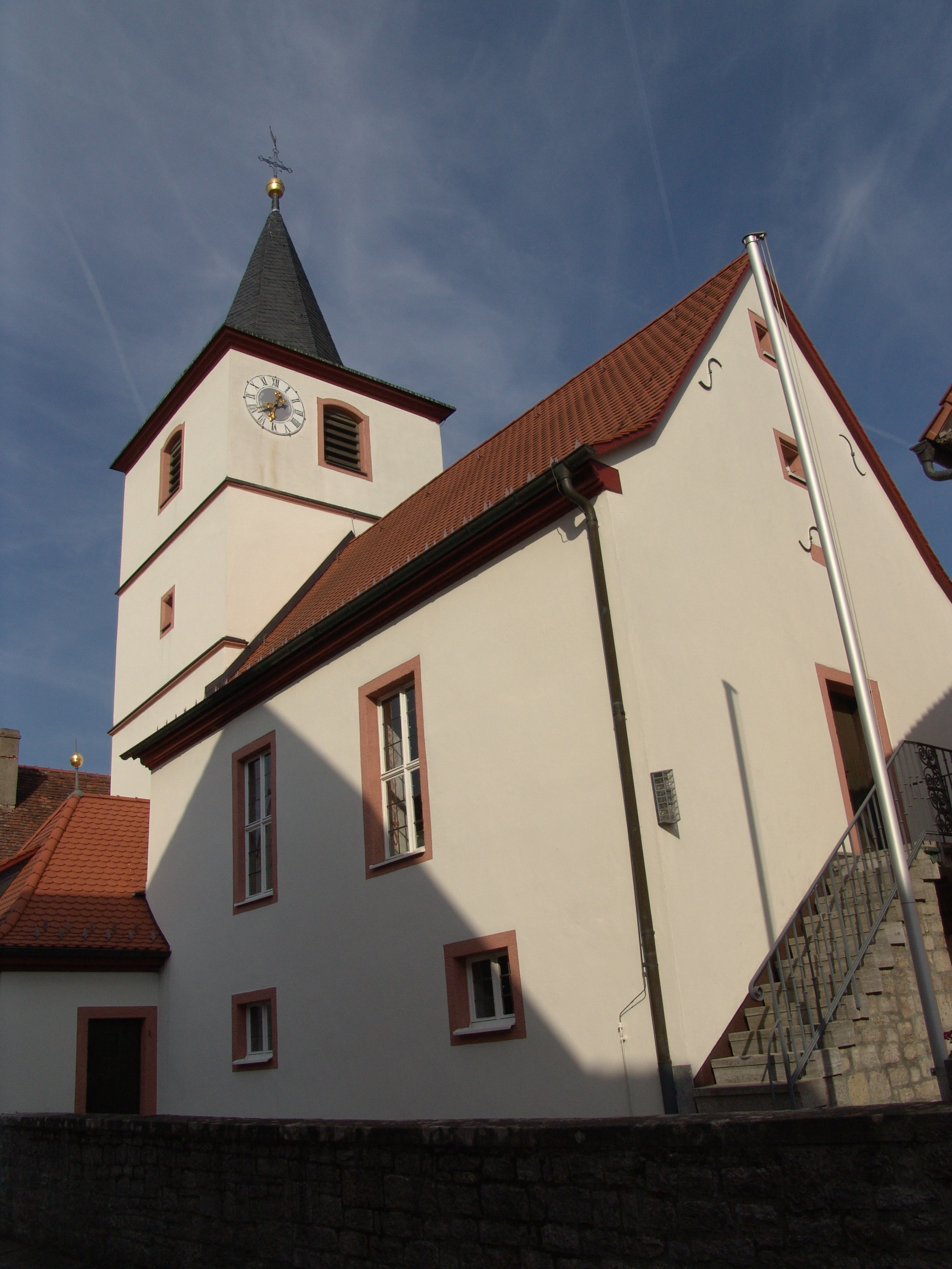 Geroldshausen Evangelische Kirche